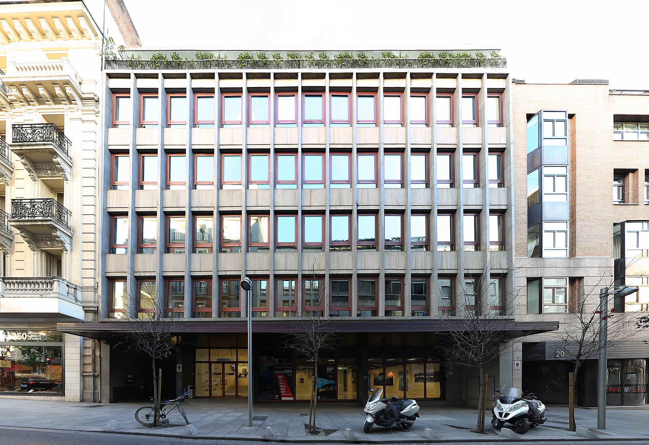 Fachada de la sede actual, en calle Recoletos.